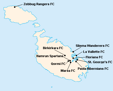 Répartition des clubs en First Division Maltaise 1979-1980.